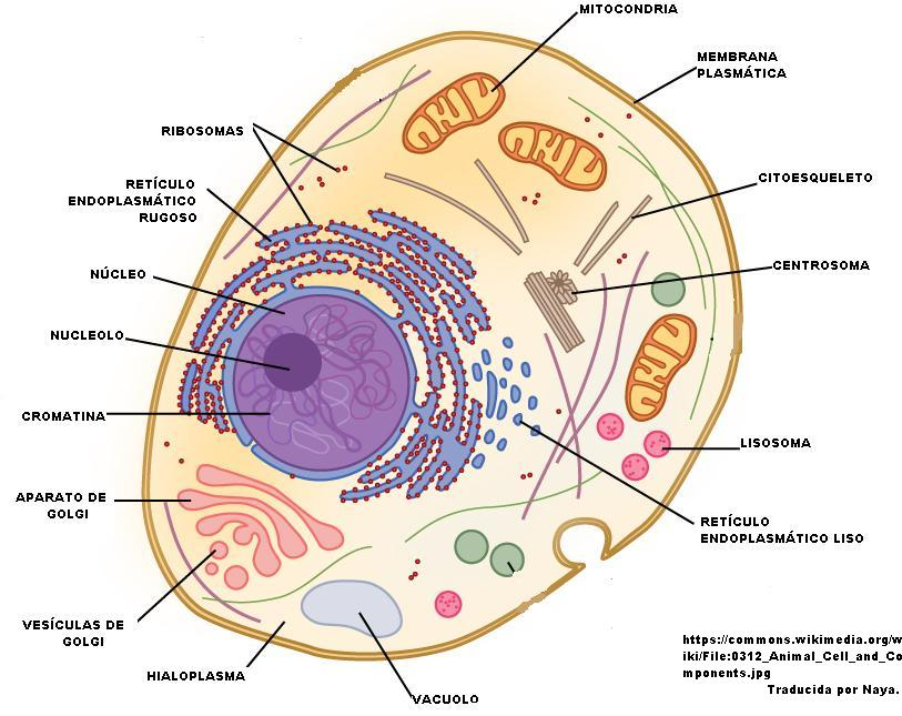 Célula Animal y componentes